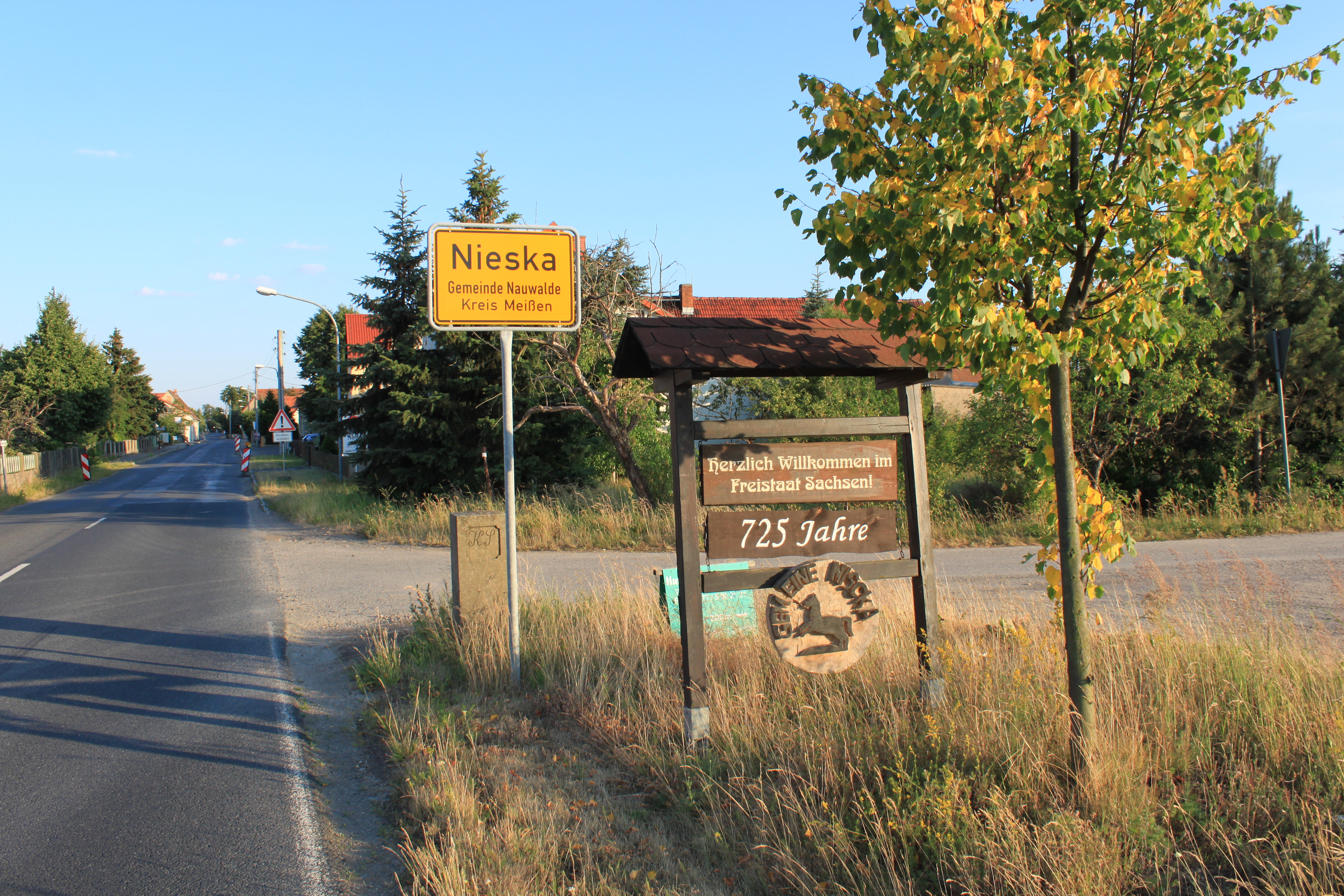 Grenzstein in Nieska zwischen den Königreichen Preußen und Sachsen, heute Länder Brandenburg und Sachsen.